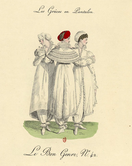 Gravure coloriée à la main de la série Le Bon Genre publiée par Pierre de la Mésangère.